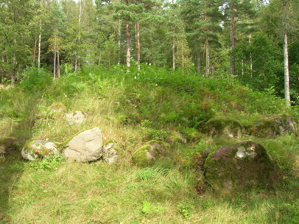 Gravhaug i Søndre Hella på Nøtterøy